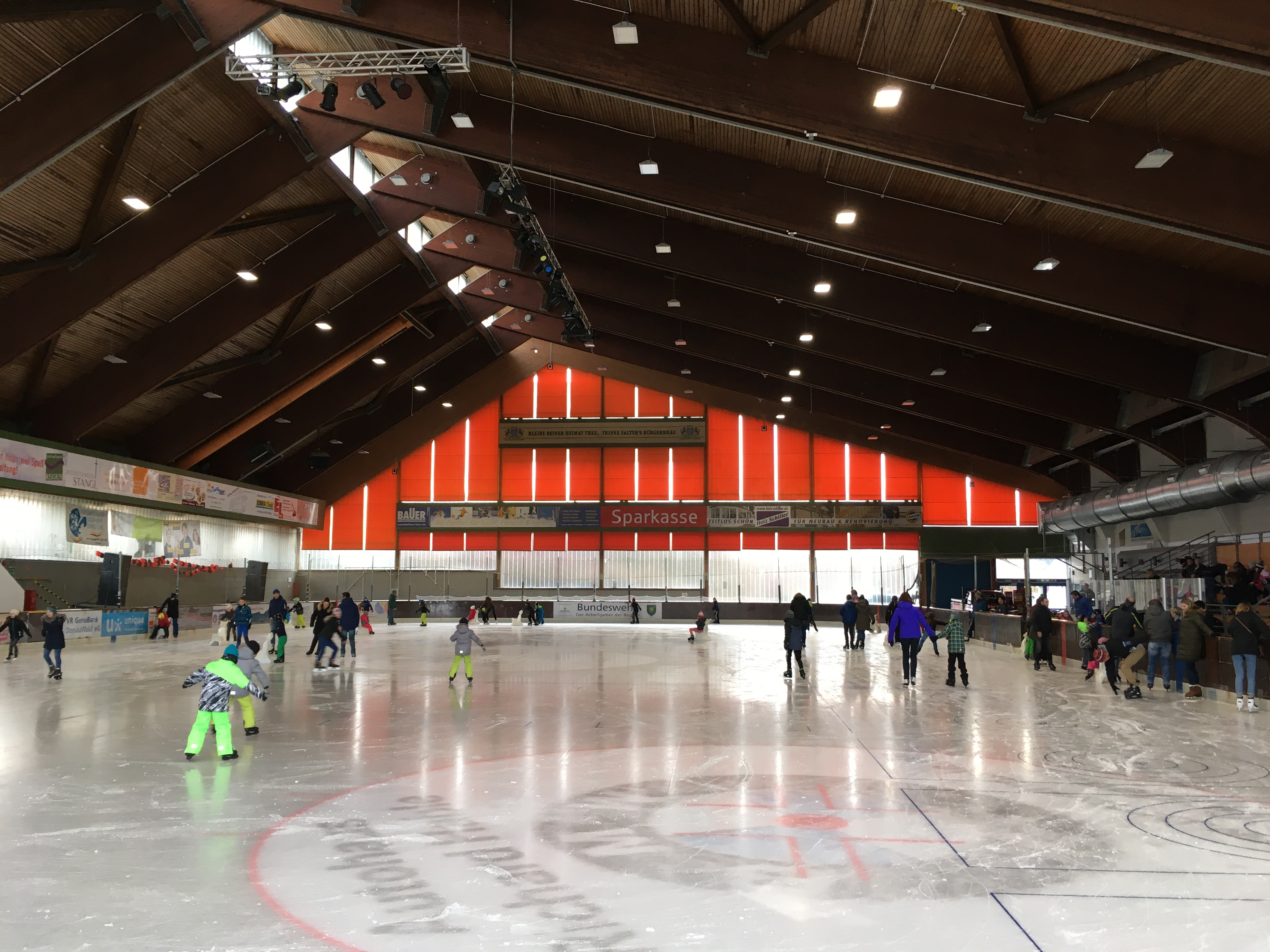 Eishalle Regen